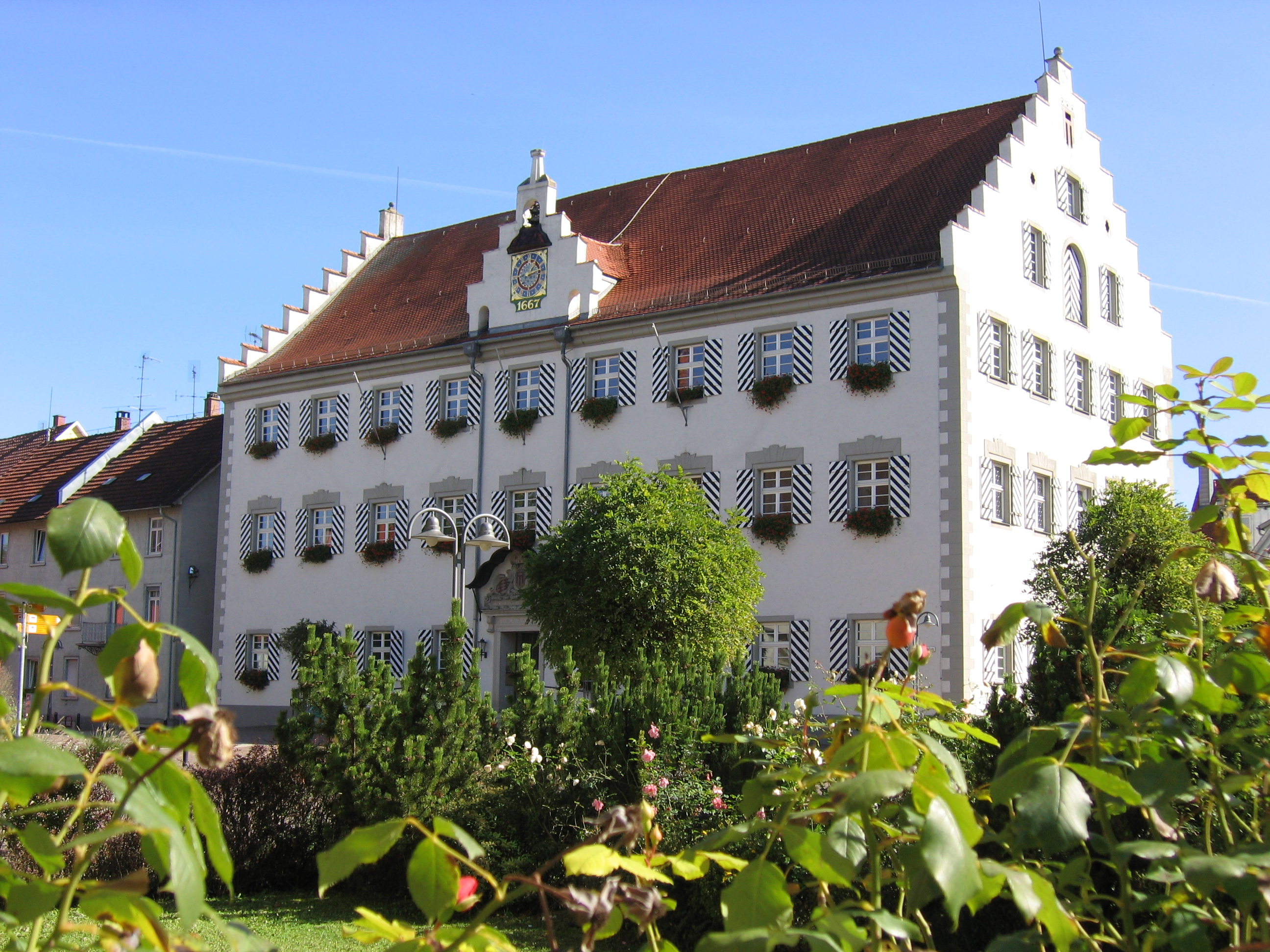 Deutschland - Baden-Württemberg - Bodenseekreis - Tettnang: Altes Schloss, heute Rathaus; Süd-Westseite